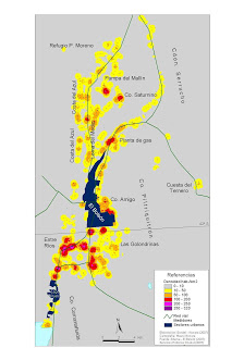 mapa del paralelo 42